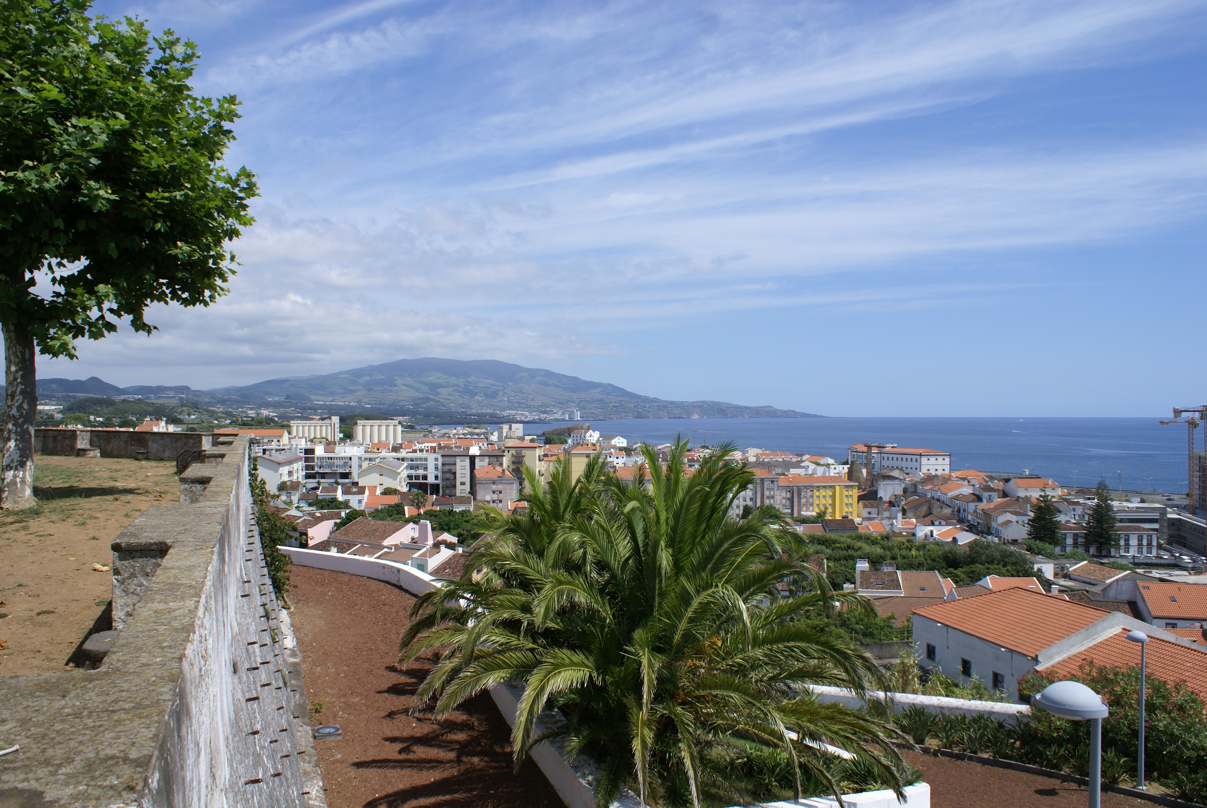 Vista sobre Ponta Delgada, foto tirada do adro da Igreja da Mãe de Deus, Ilha de São Miguel, Açores